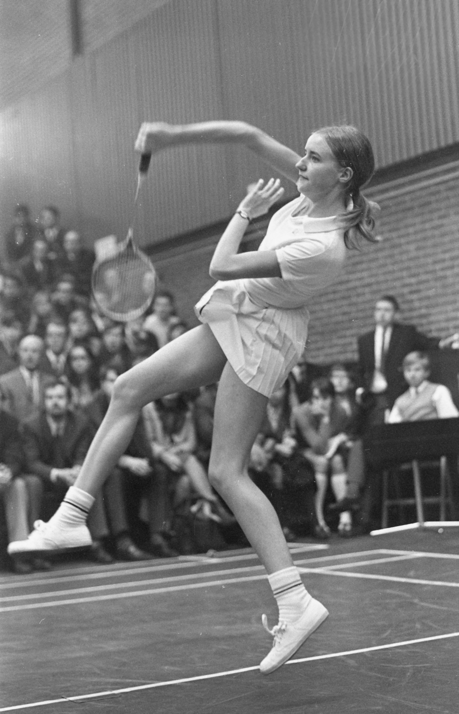 Internationale Badmintonkampioenschappen te Haarlem Gillian Perrin (Gillian Gilks)